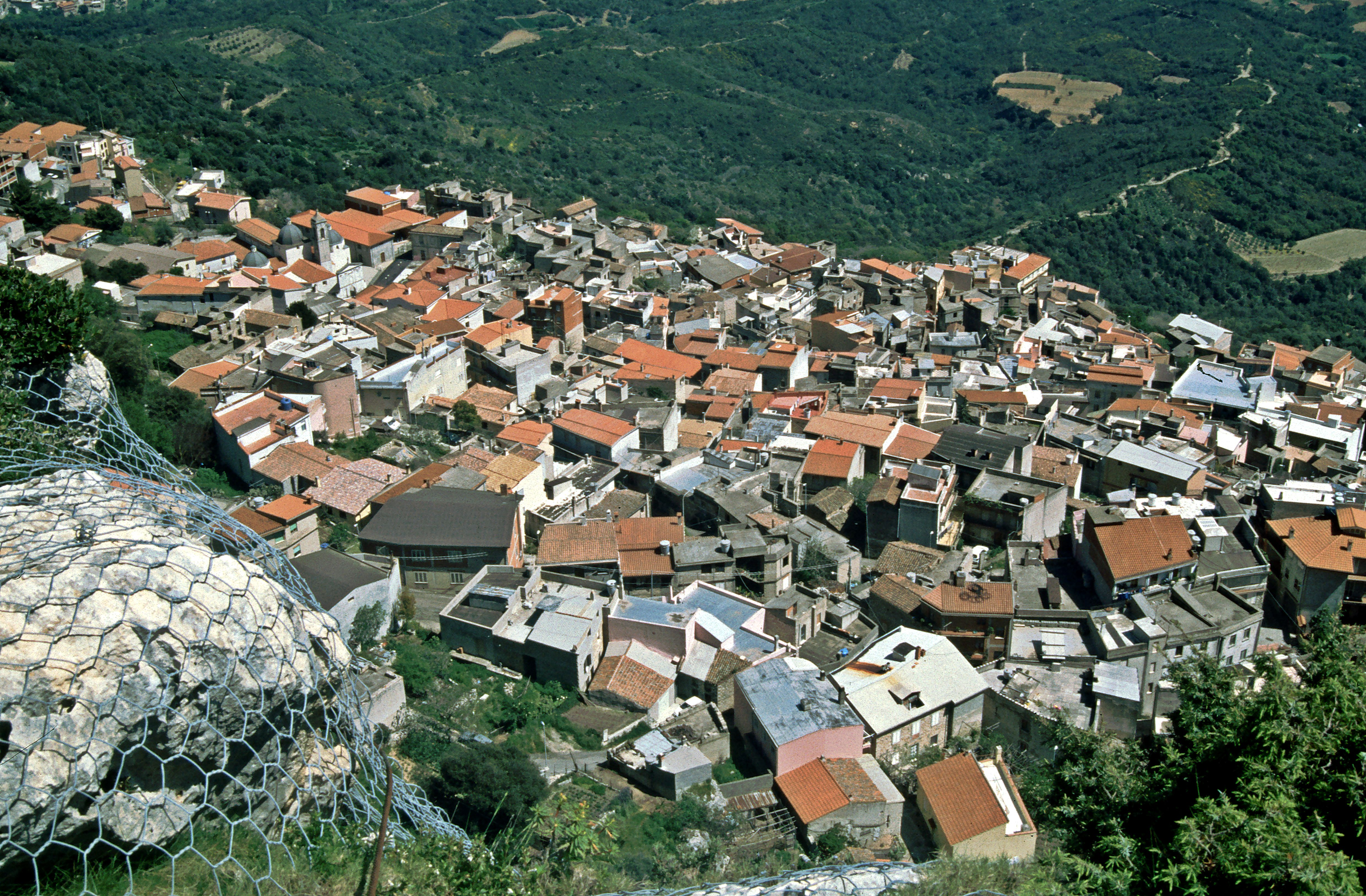 Blick auf Baunei